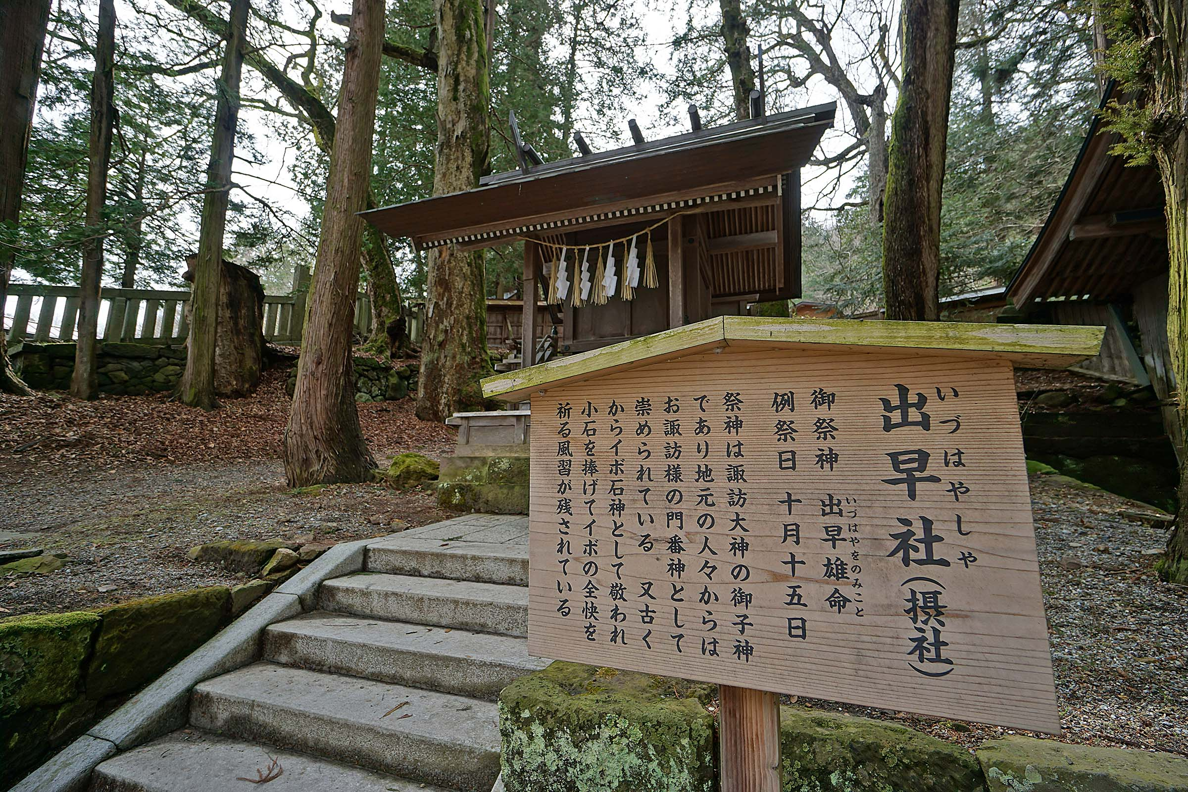 Suwa taisha Kamisha Honmiya , 諏訪大社 上社 本宮